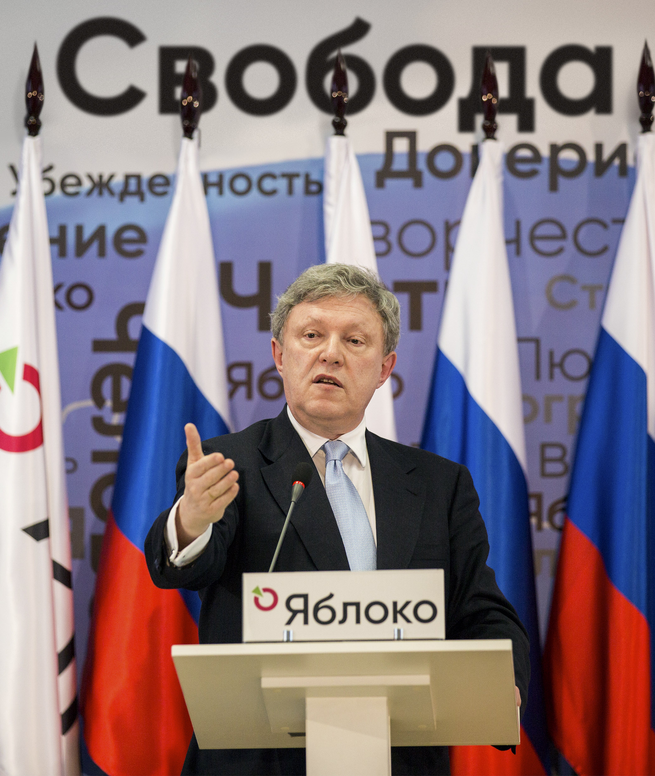 Григорий Явлинский на заседании Федерального политсовета партии Яблоко в 2017 году